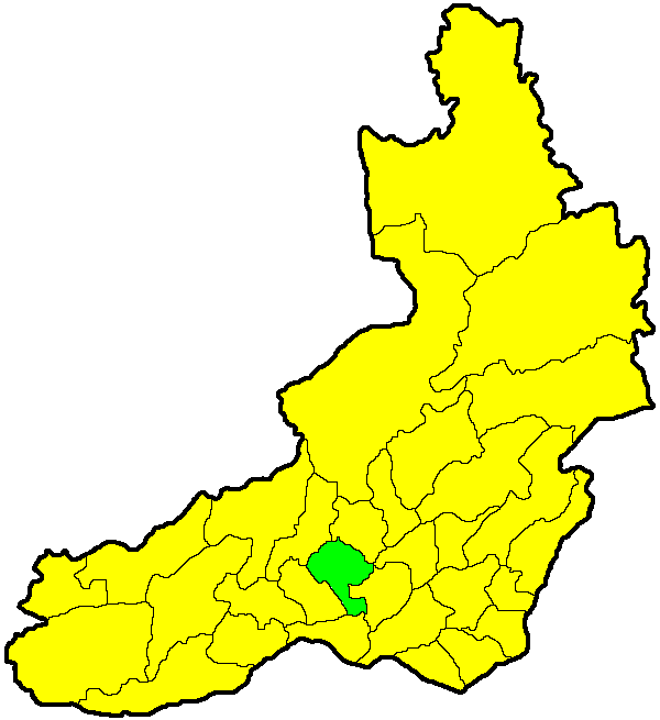 Могойтуйский район на карте Забайкальского края